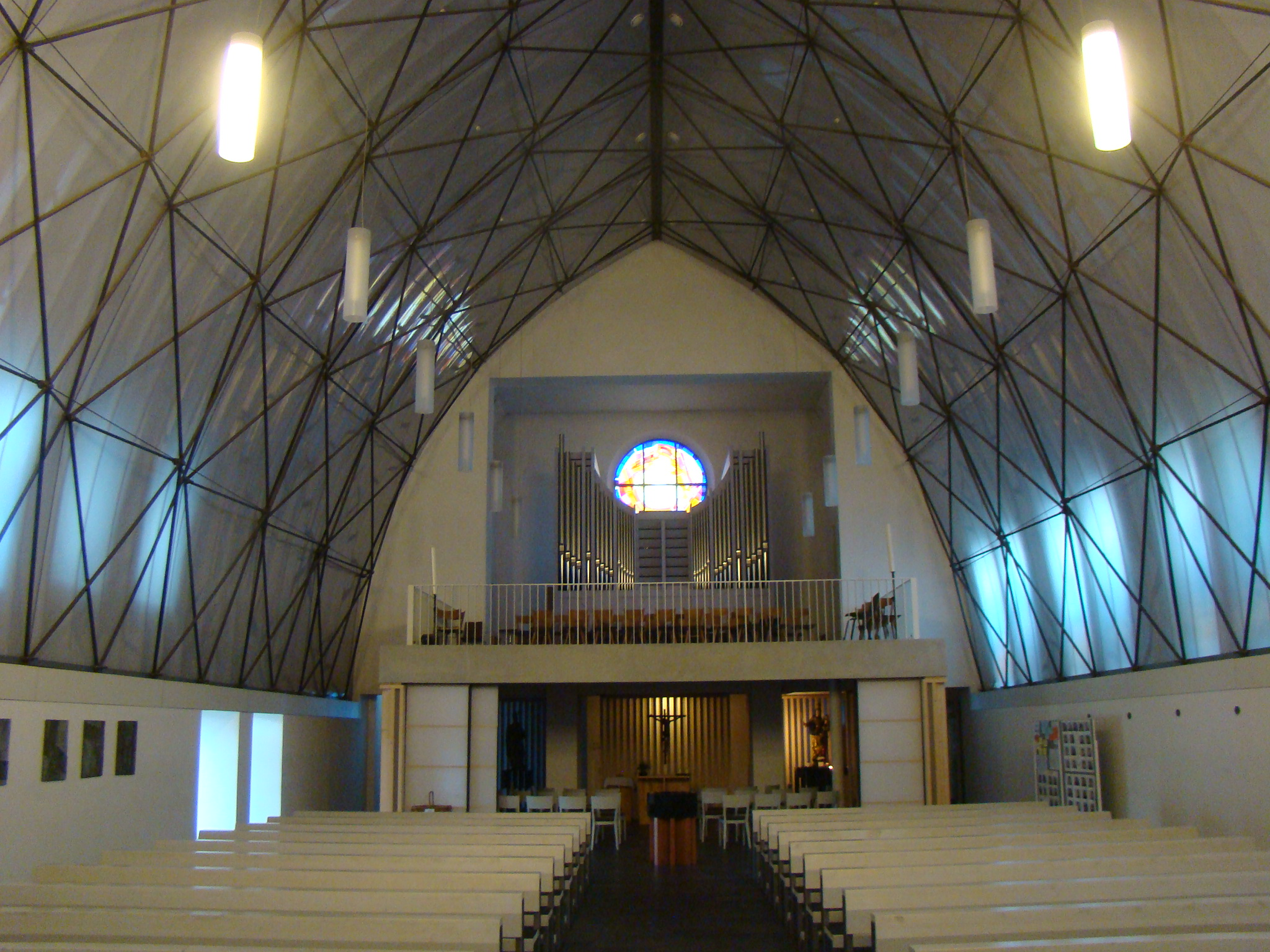 Augustinuskirche in Heilbronn